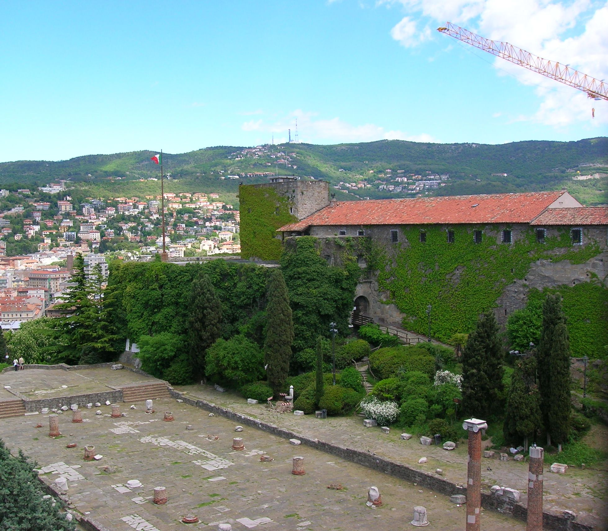 Castello di San Giusto, Trieste. Vista dall'alto